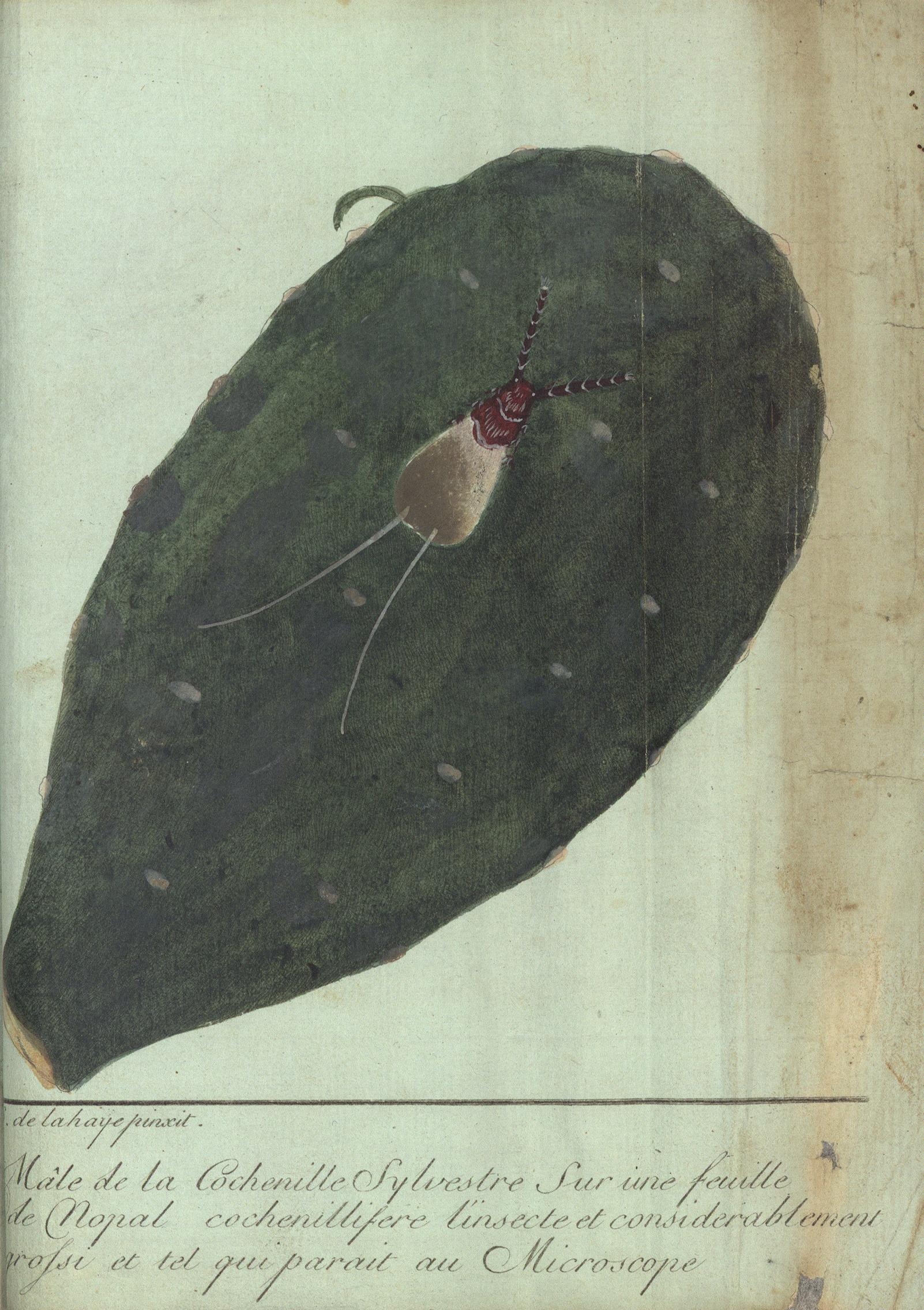 Opuntienblatt mit Schildlaus aus Thiérys Werk.